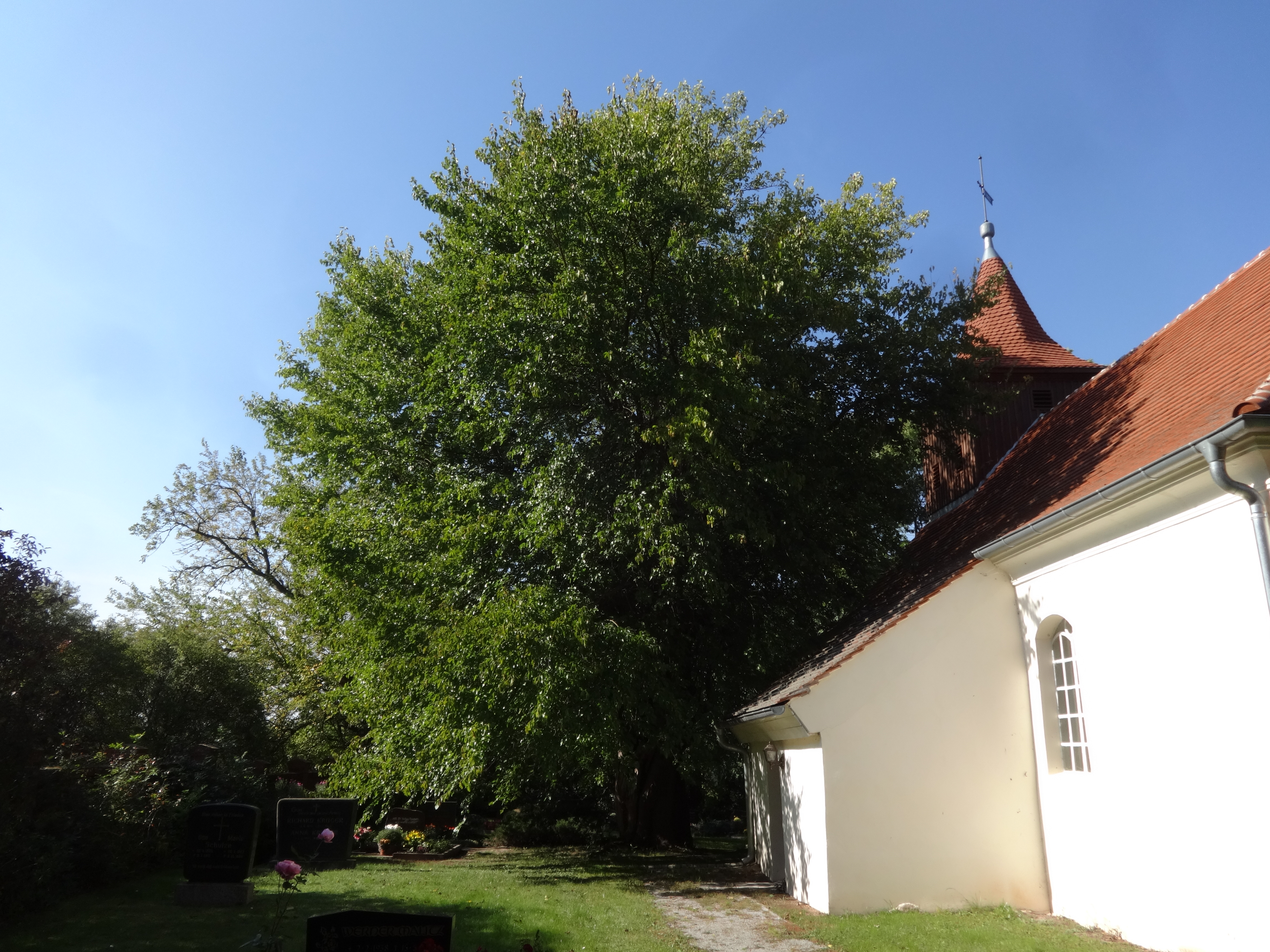 Die Dorfkirche in Birkholz der Gemeinde Rietz-Neuendorf im Landkreis Oder-Spree in Brandenburg ist eine mittelalterliche Saalkirche, die in der Mitte des 18. Jahrhunderts grundlegend umgebaut wurde. Im Innern stehen unter anderem fünf spätgotische Schnitzfiguren.